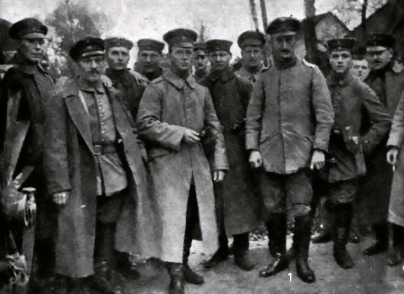 Sprengkommando Polangen